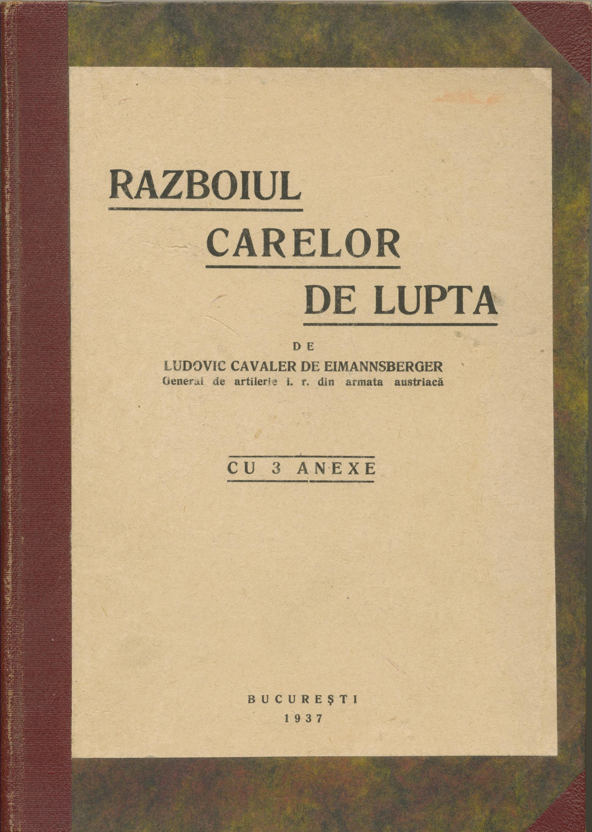 Buch von Gen. v. Eimannsberger auf Rumänisch (erhältl. auch in Französisch, Polnisch und Russisch)